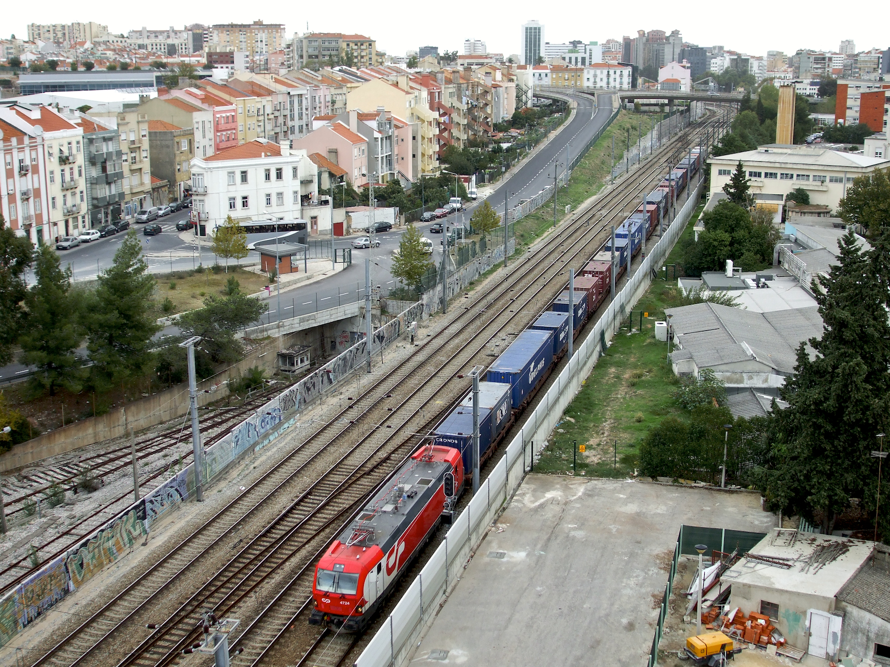 Tipo: Comboio de Volta (transporte de contentores) 77360/1 [Bobadela - Alcântara • Terra] Local: Sete Rios (Lisboa) [Linha de Cintura, PK 4] Data e hora: 5 de Novembro de 2009 [09h51] Material: Locomotiva 4724 + xx vagões CP Sggmrss e outros